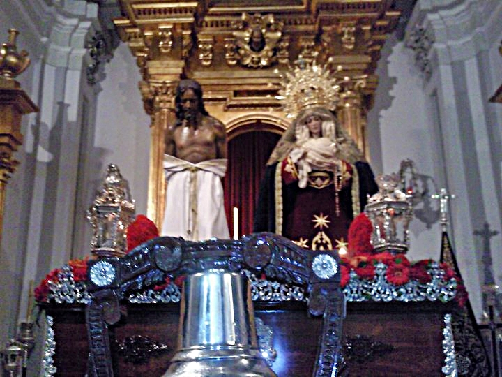 Traslado de Humillación y Estrella en su capilla de Santo Domingo, 2011